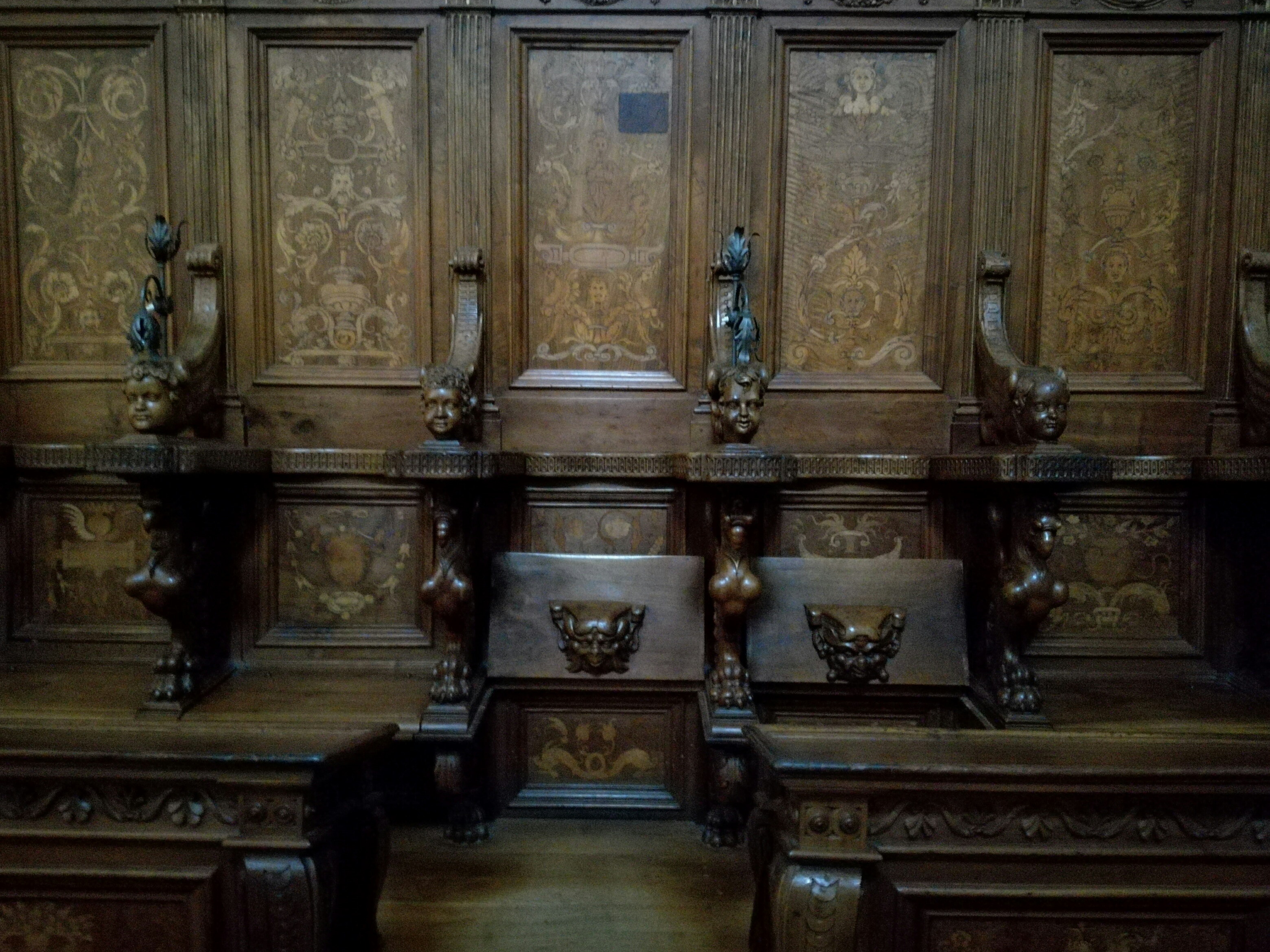 coro ligneo san lorenzo certosa